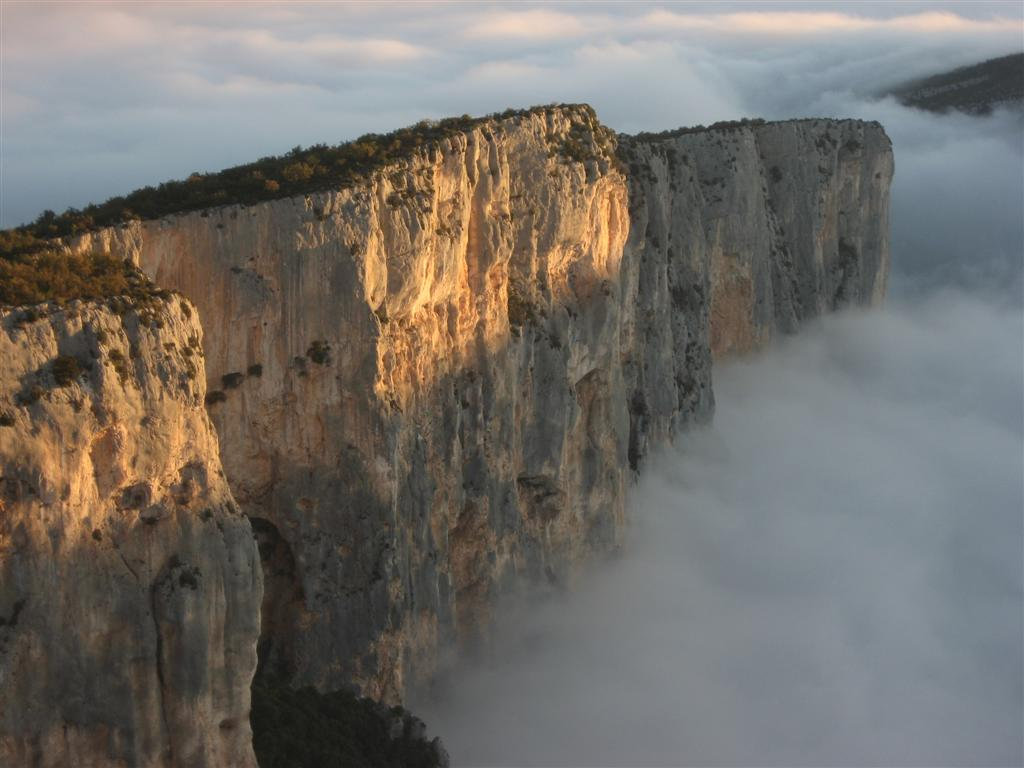 Brume matinale sur l'Escalès.